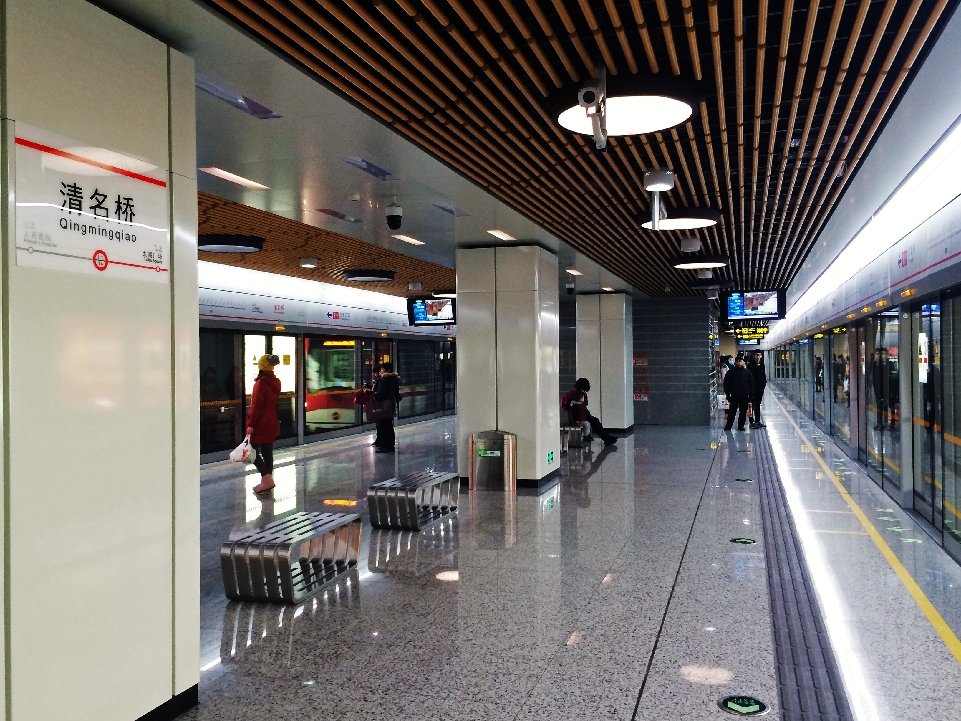 無錫地鐵清名橋站月臺